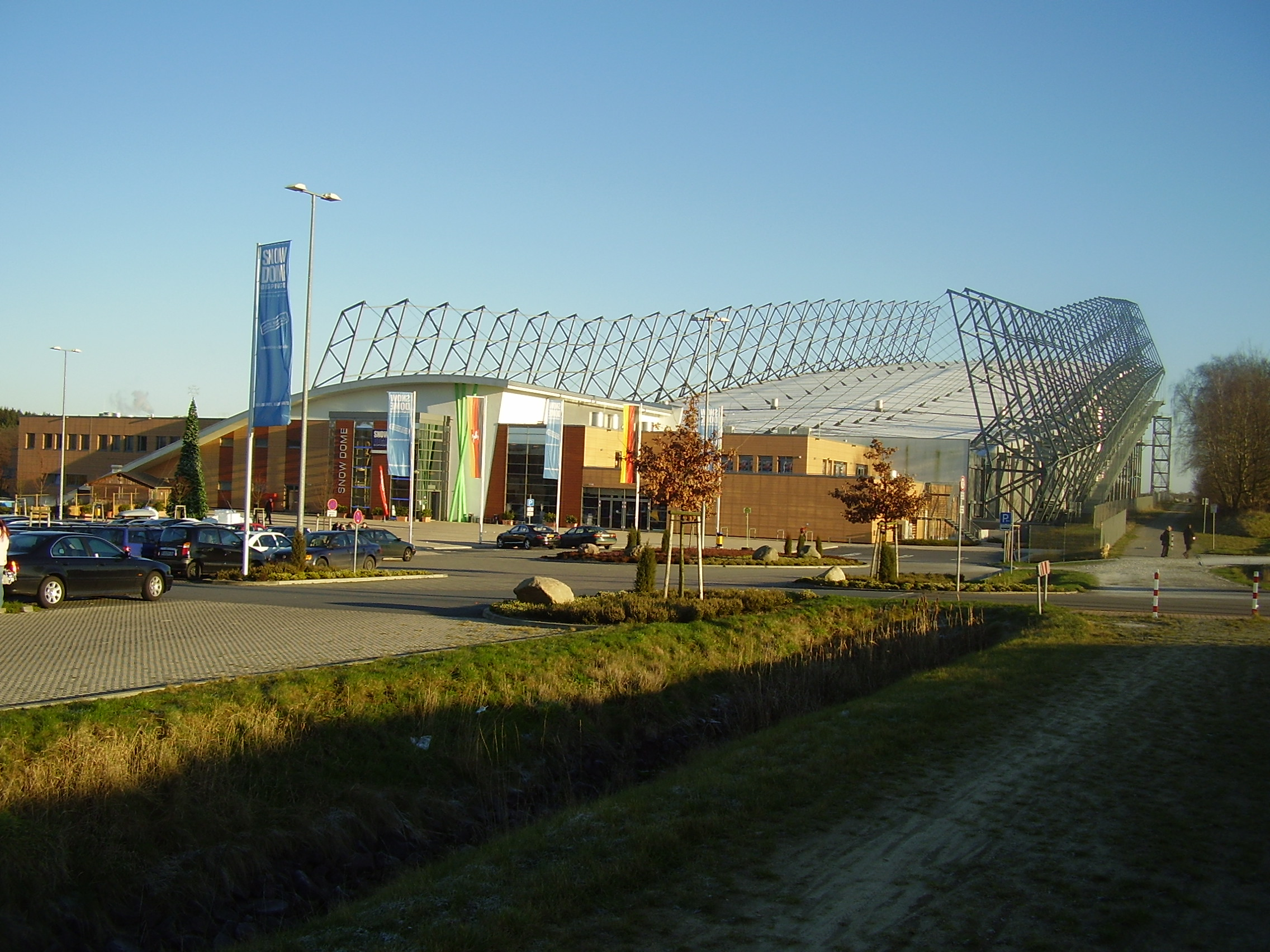 Außenansicht Snowdome Bispingen, 2008